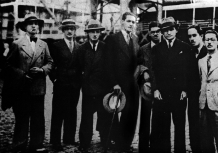 Os membros da Academia dos Rebeldes, em 1923. Jorge Amado é o terceiro da esquerda para a direita